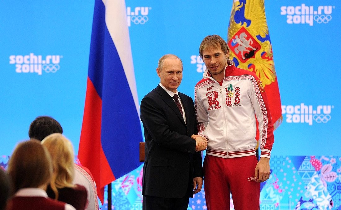 Орденом Дружбы награждён олимпийский чемпион в биатлоне Антон Шипулин.